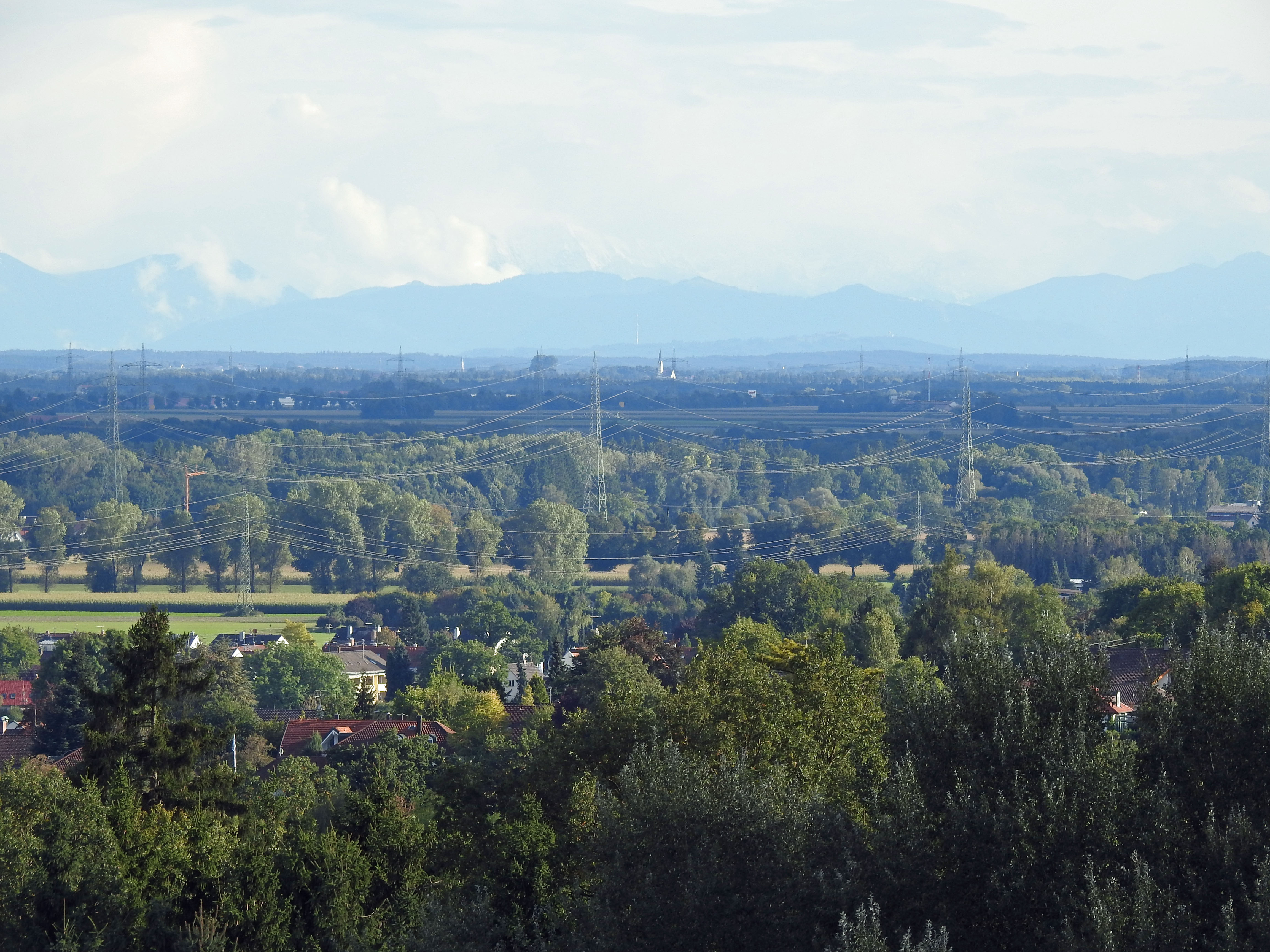 Blick über das Lechfeld südlich von Augsburg zum Alpenvorland und einigen Hügeln mit Kirchen, schwach im Dunst der Wolken sind die nördlichen Alpen zu erahnen. Der Sendeturm hinter einem weissen Kirchturm (St. Johannes der Täufer in Scheuring) ist der Sender Hohenpeißenberg.